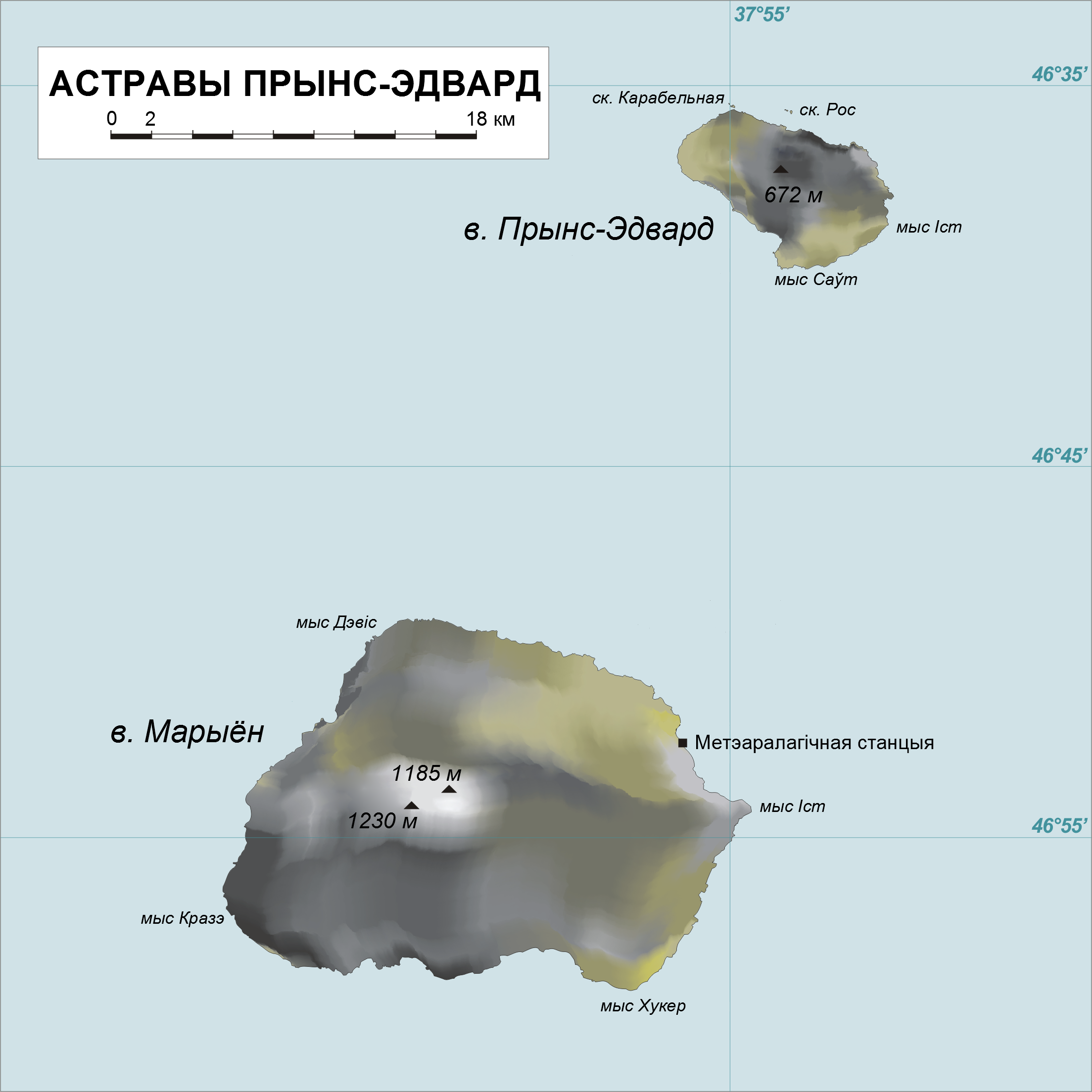 Астравы Прынс-Эдвард, карта